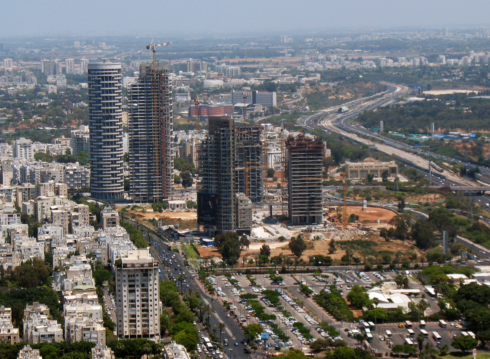 Park Tzameret, Tel Aviv, Israel